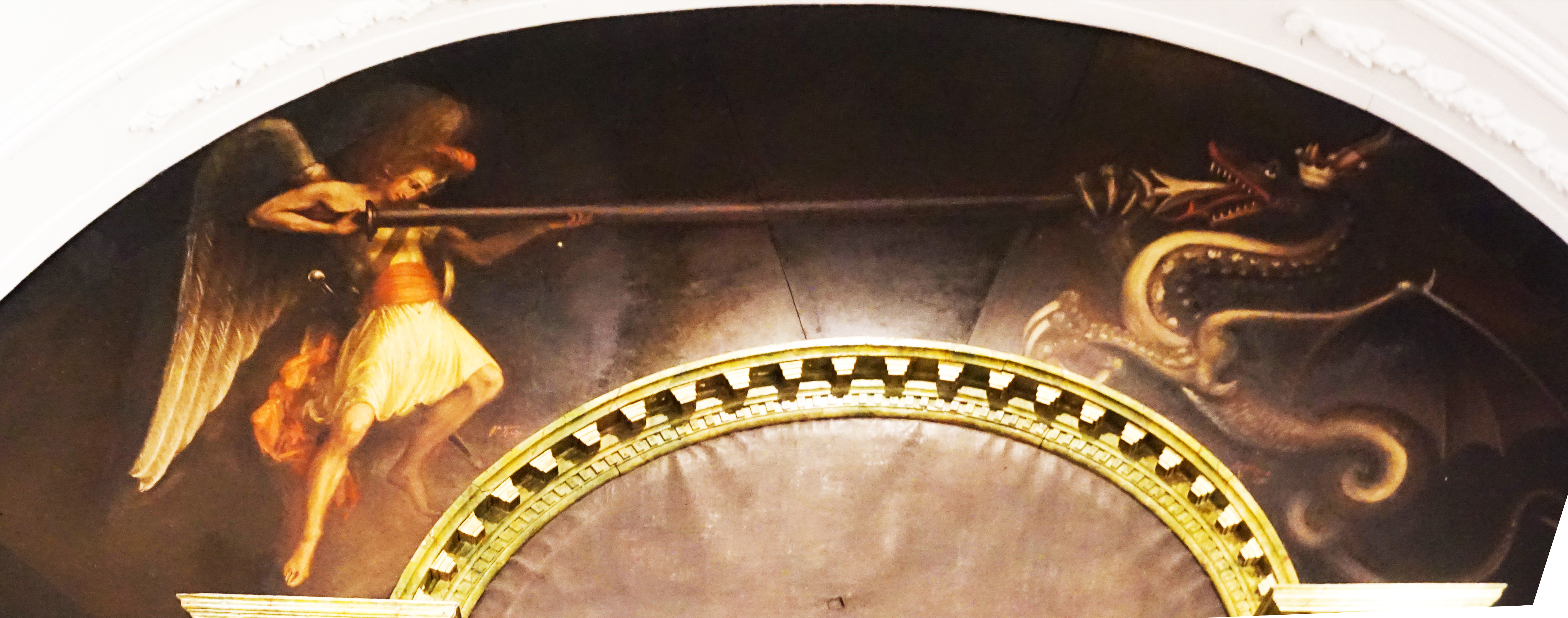 Jacob Ydema, H. Michael verslaat de duivel als draak